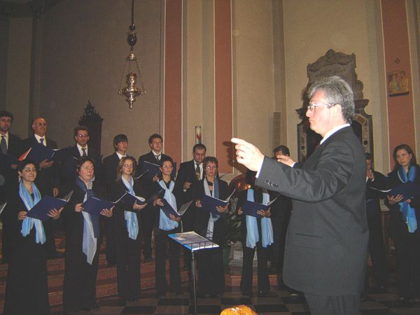 foto autorizzata a Jacobus dal direttore del coro Portelli di Mariano del friuli